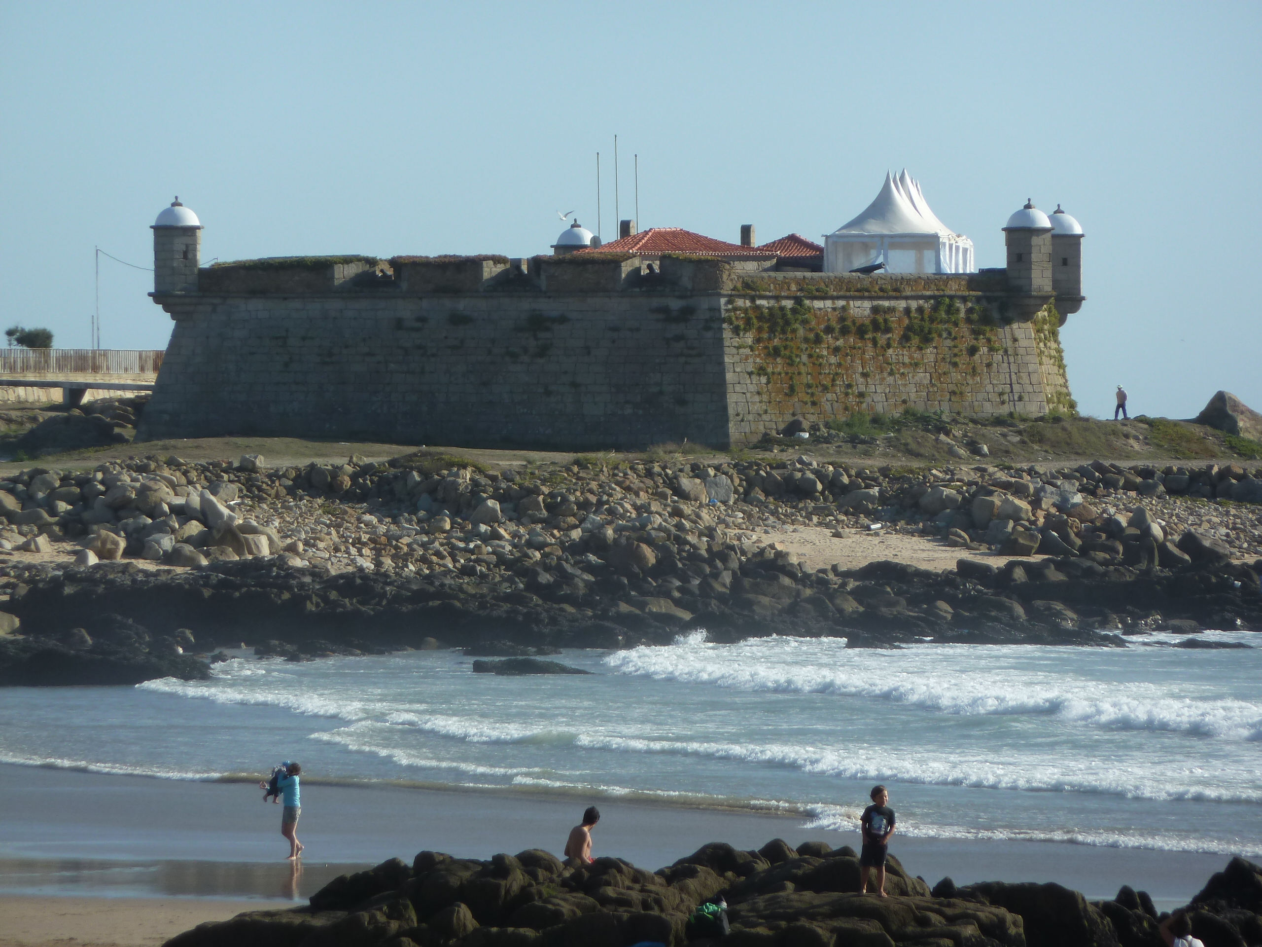 Forte de San Francisco Xavier ou Castelo do Queixo (Porto) This file was uploaded for Wiki Loves Monuments in Portugal with the unique identifier 74496.